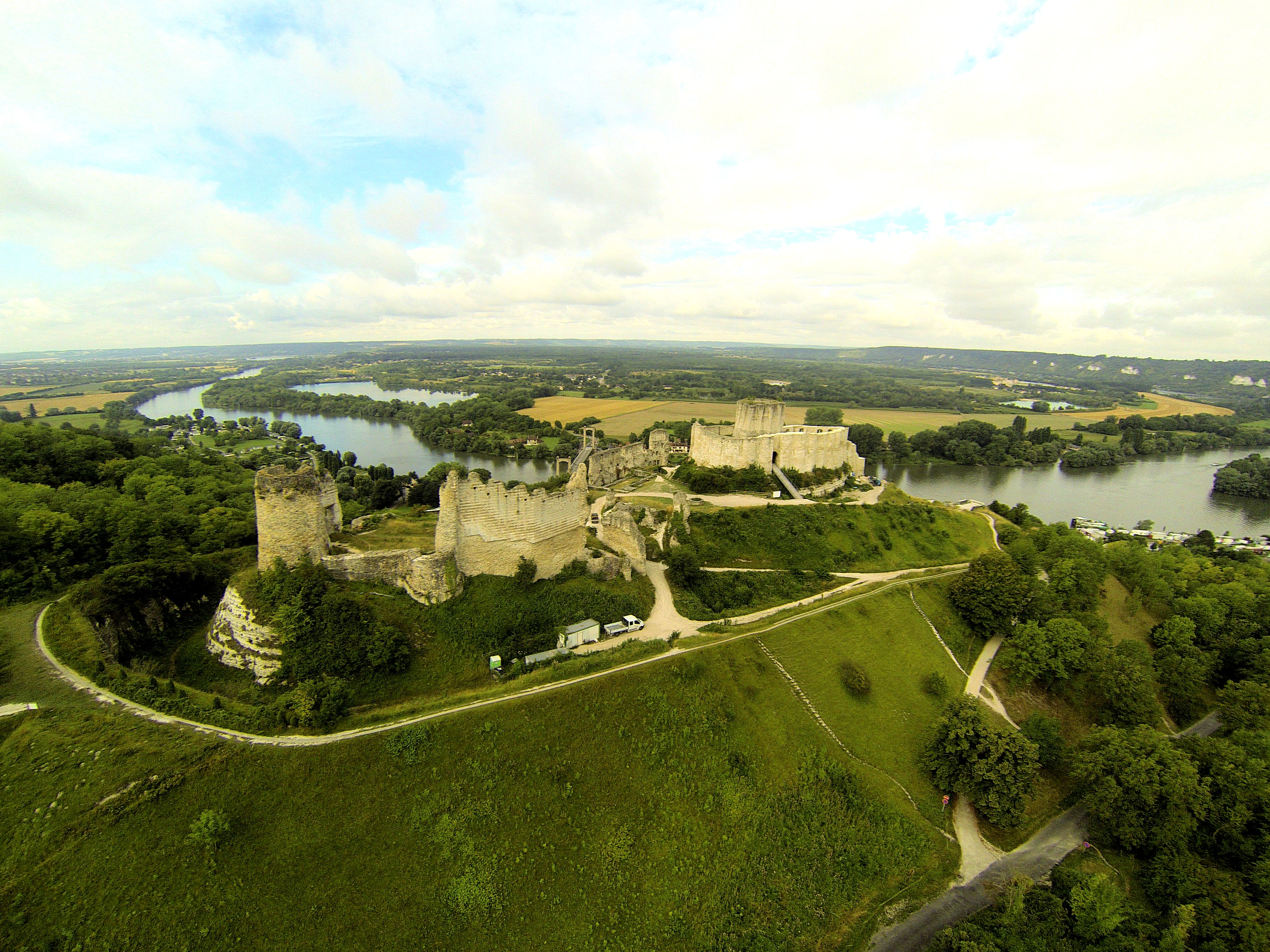 Château Gaillard, Les Andelys, Eure, Normandie